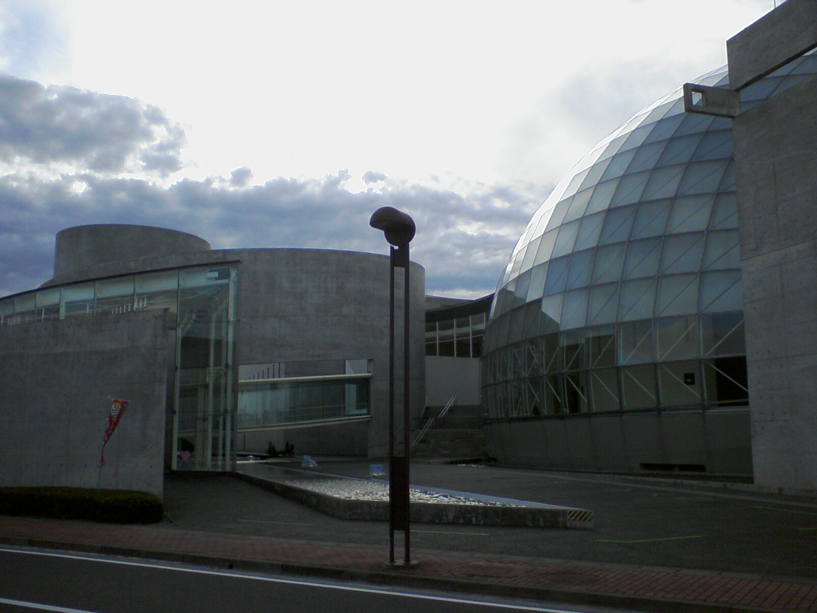 那須野が原ハーモニーホール(右に小ホール部、左に事務所、ロビー)